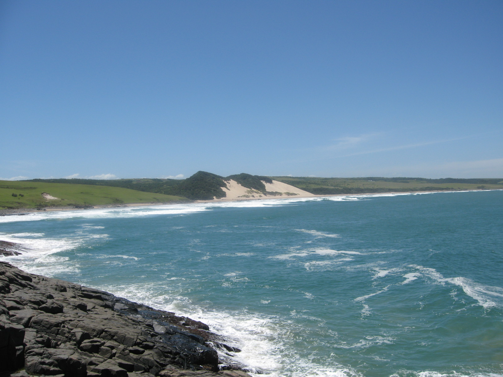 Mazeppa Bay